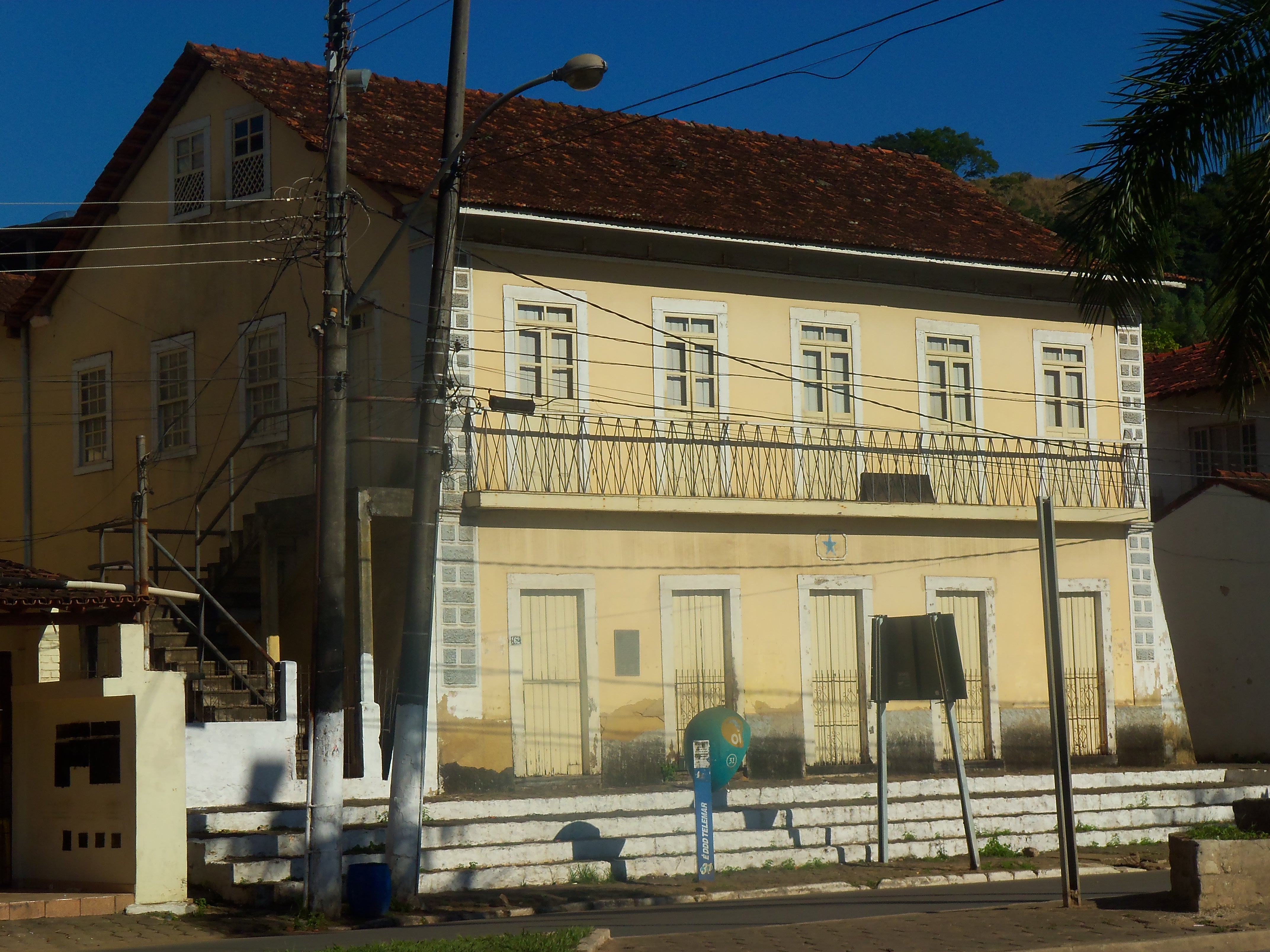 Antiga residência da família Agostini, em Fundão, Espírito Santo. Atual Casa da Cultura Doutor Mauro Mattos Pereira. Patrimônio cultural do Espírito Santo.